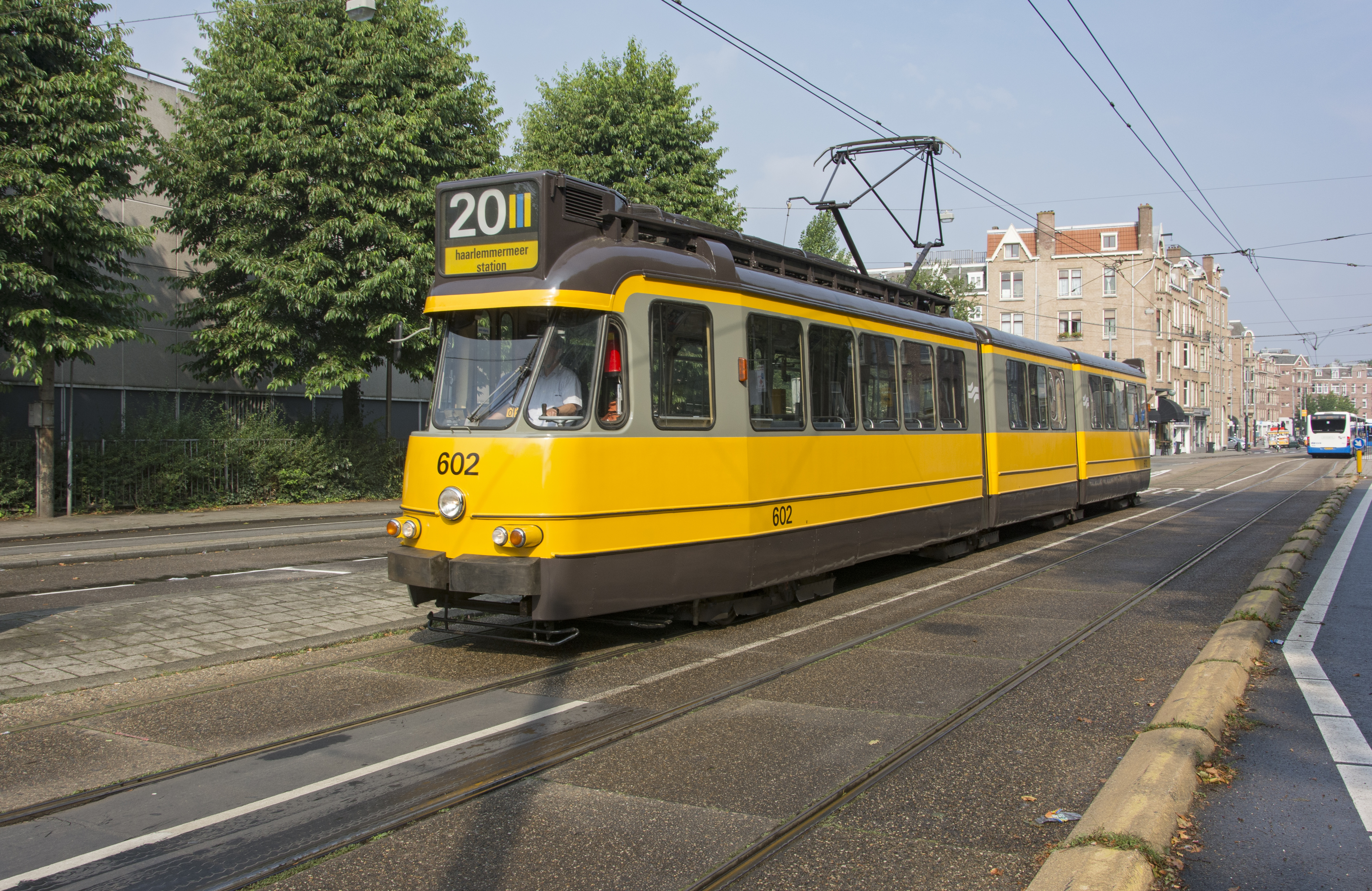 Museum Tram 602 komt aan bij het Amsterdamse Haarlemmermeer Station. De tram zal vervolgens op lijn 20 van de Tourist Tram ritten door de stad maken.